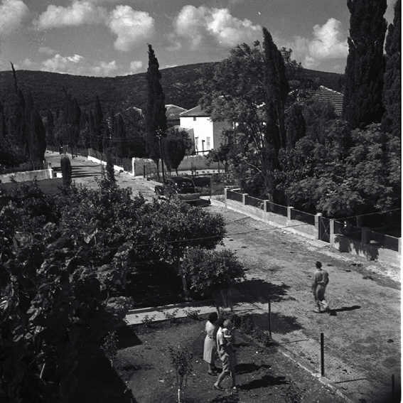 בת שלמה - הרחוב הראשי בבת שלמה